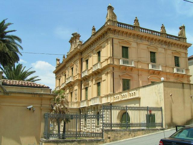 VILLA RENDANO A COSENZA NELLA ZONA ANTICA DEL CAPOLUOGO